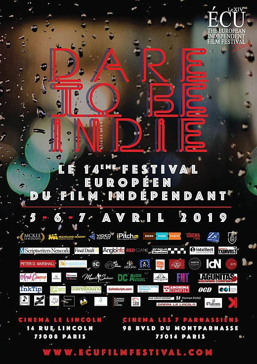 Affiche d'ÉCU 2019